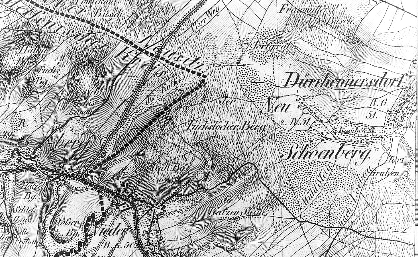 Original image description from the Deutsche Fotothek Dürrhennersdorf. Oberreit, Sect. Stolpen, 1821/22